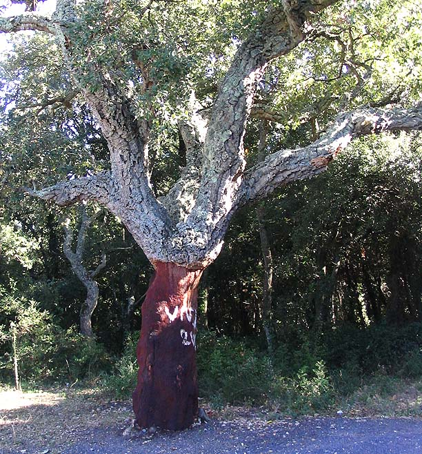 Quercus suber (chêne-liège) quelques semaines après la levée du liège Photo prise à Vivès (66) en octobre 2004 Jean Tosti 10/2004